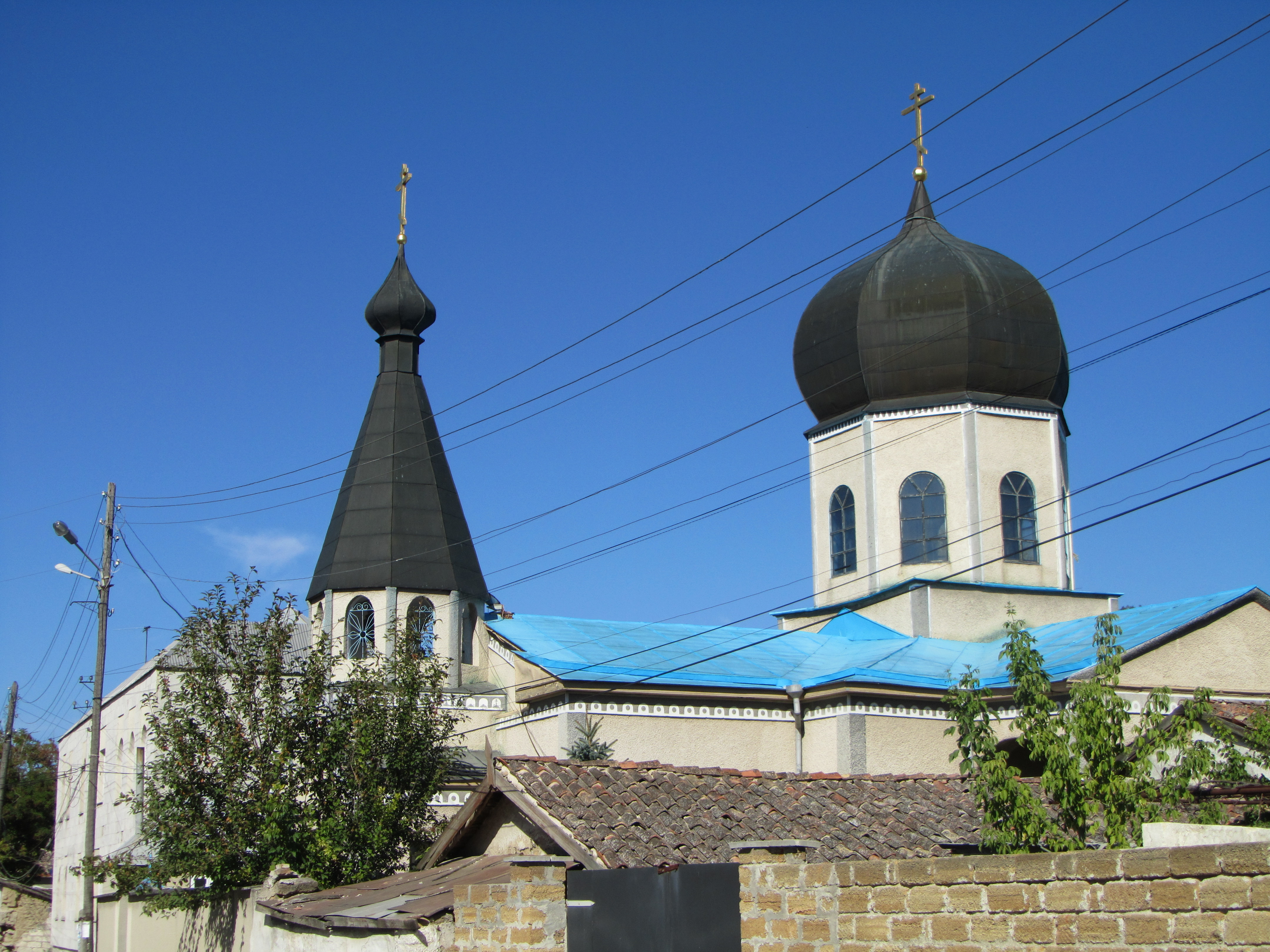 Свято-Нікольский храм 1793 р._м.Білогірськ (Карасубазар) Крим